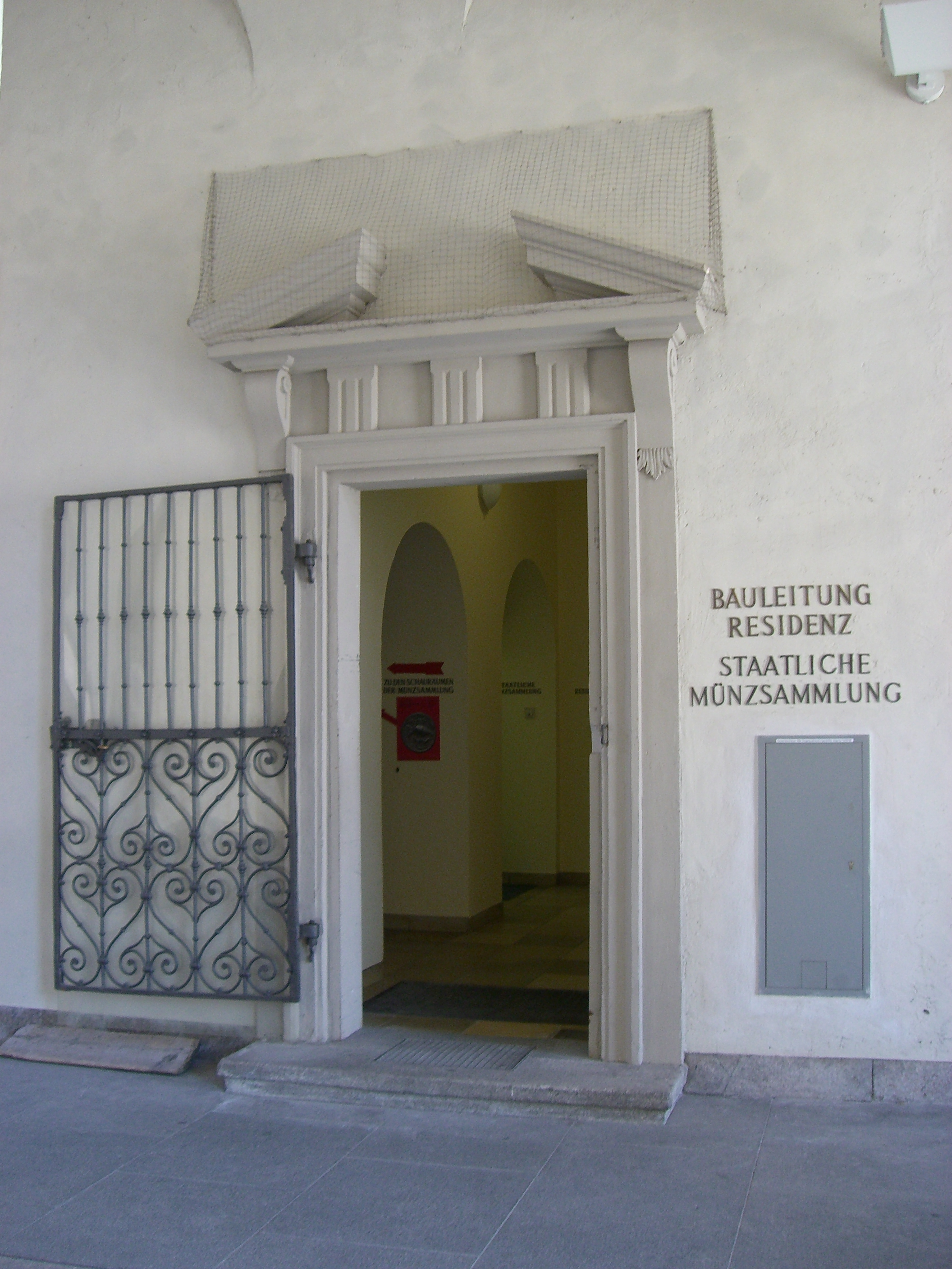 Staatliche Münzsammlung (Eingang)